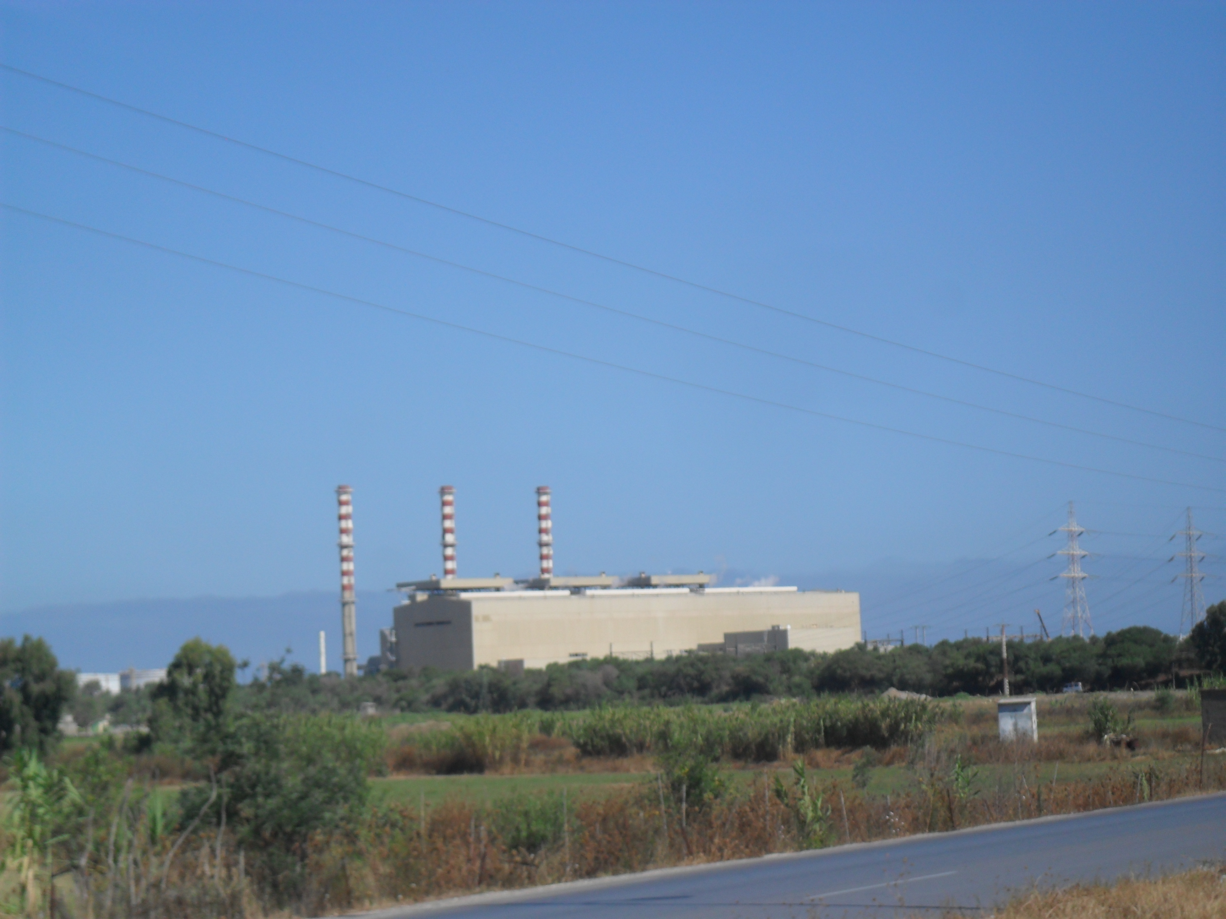 Centrale Electrique d'Achouat, Taher (Algérie)